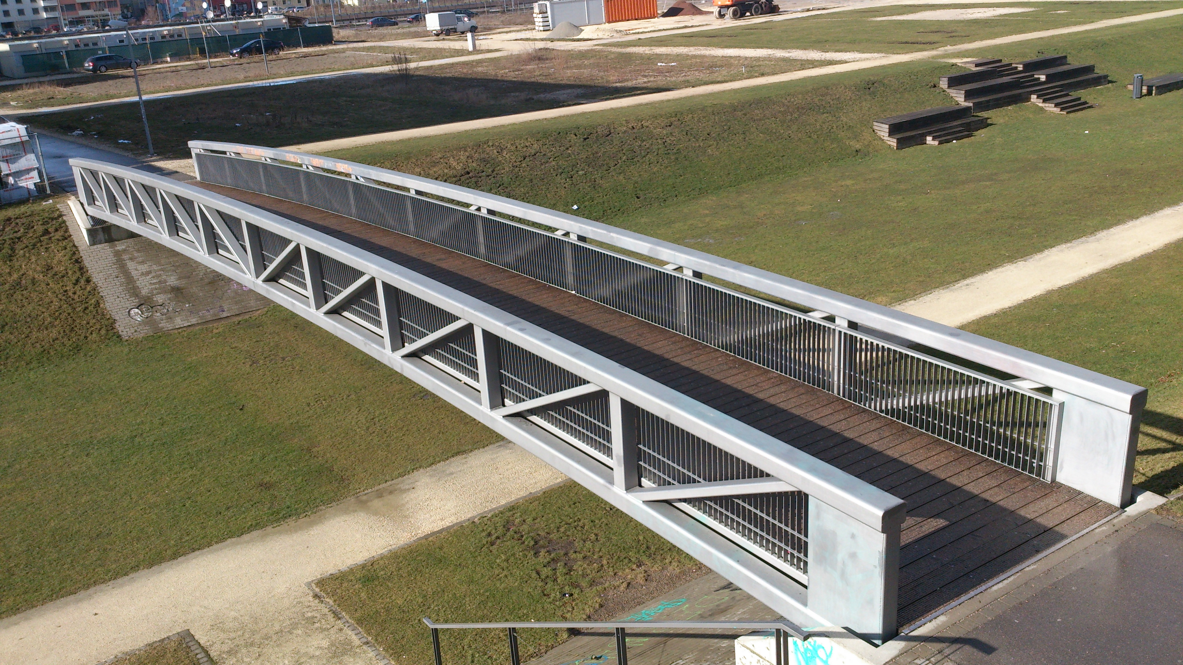 Im Caponniere-Park in Neu-Ulm.